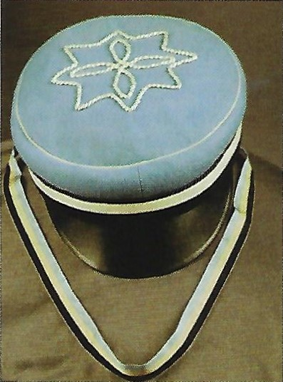 Couleur (Deckel und Band) des Corps Rubonia